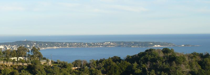 Le cap d'Antibes vu de la tour de la Castre à Cannes